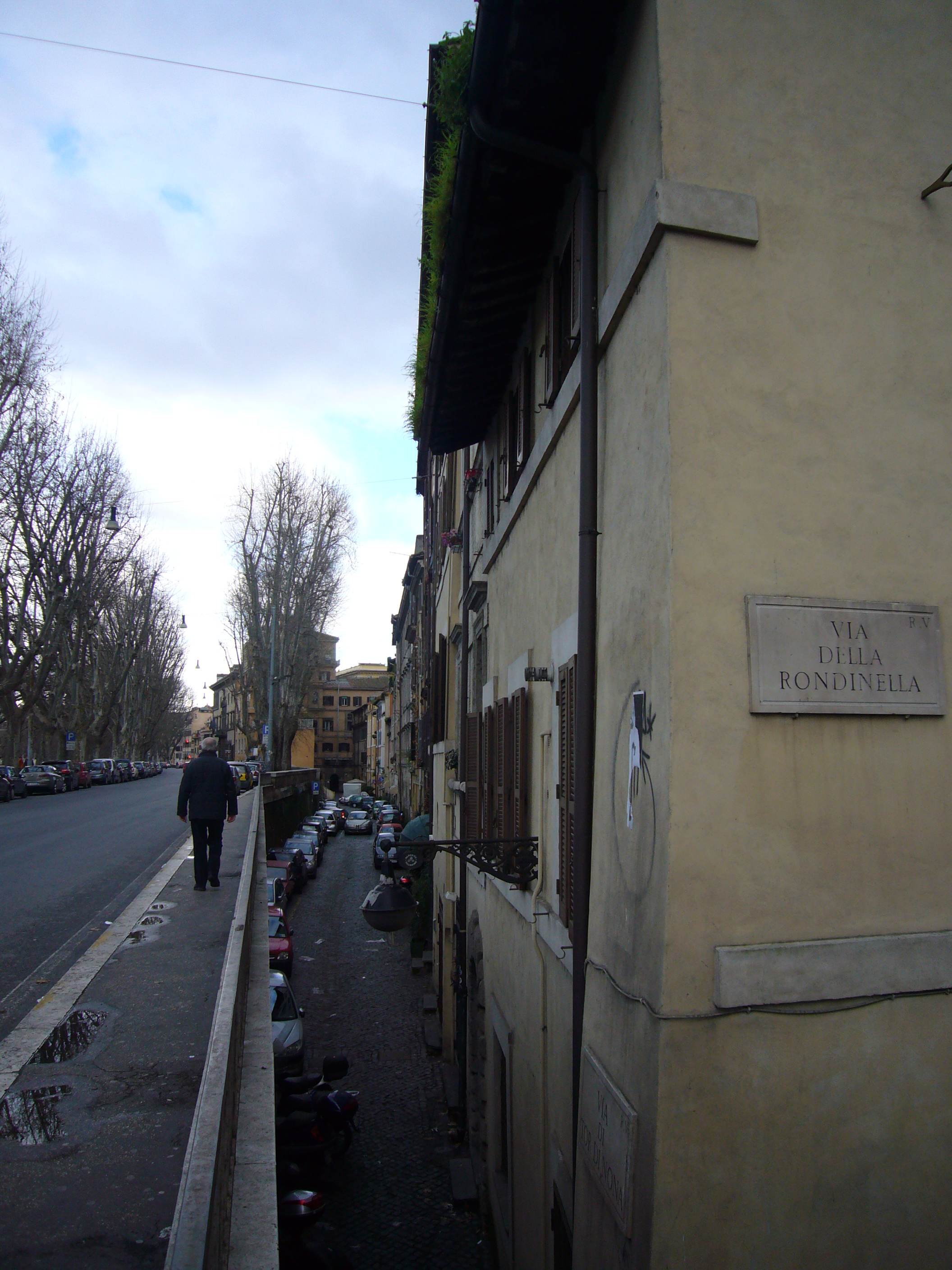 Roma, lungotevere Tor di Nona. Si noti la sopraelevazione dei muraglioni del lungotevere rispetto al piano stradale antico